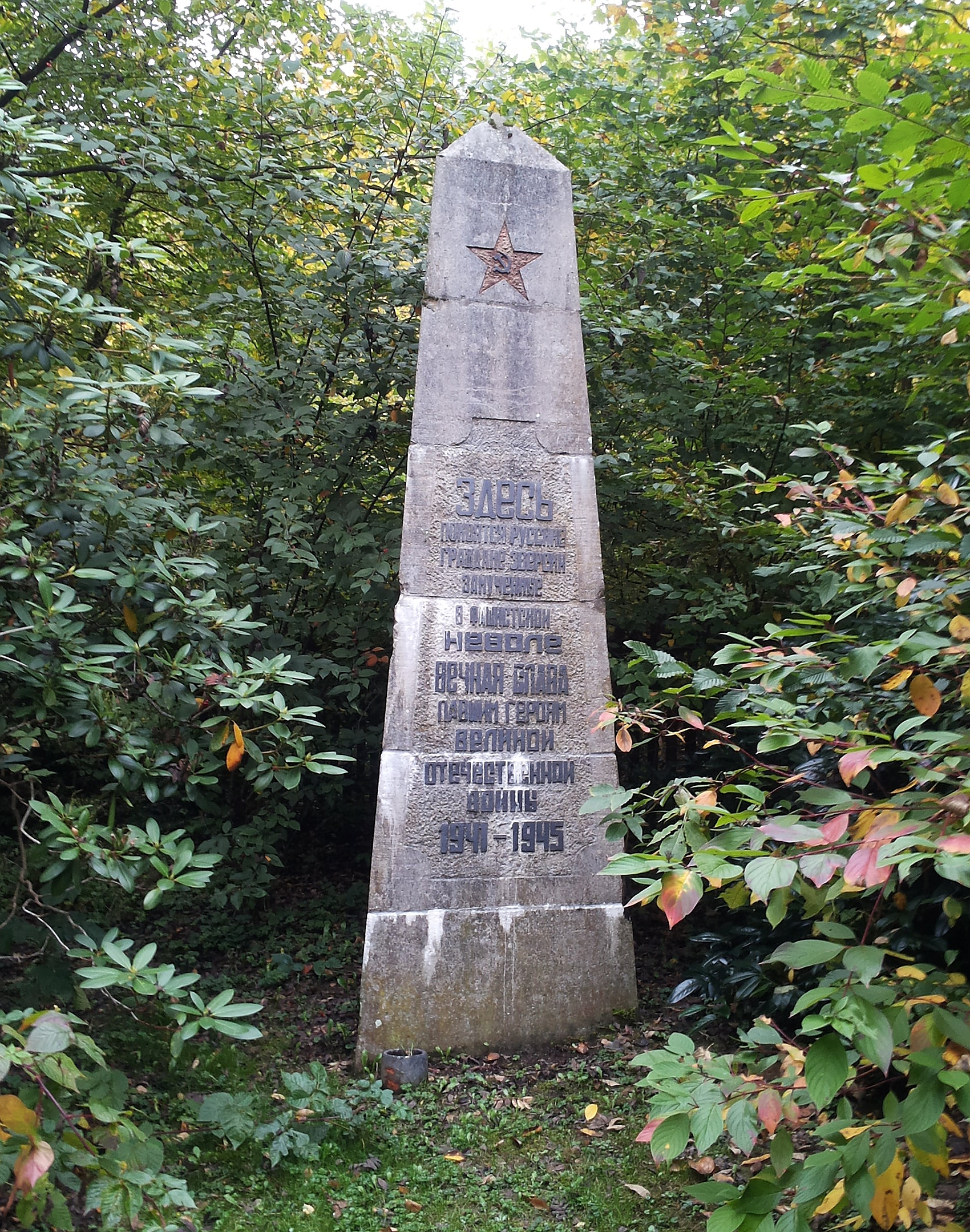 Stele, Waldfriedhof Fulmecke in Meschede (Germany) Seiteninschrift in deutsch: "HIER RUHEN RUSSISCHE BÜRGER BESTIASLISCH ERMORDET IN FASCHITISCHER GEFANGENSCHAFT EWIGER RUHM DEN GEFALLENEN HELDEN DES GROSSEN VATERLÄNDISCHEN KRIEGES 1941–1945"